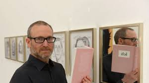 SCHIRN Kunsthalle